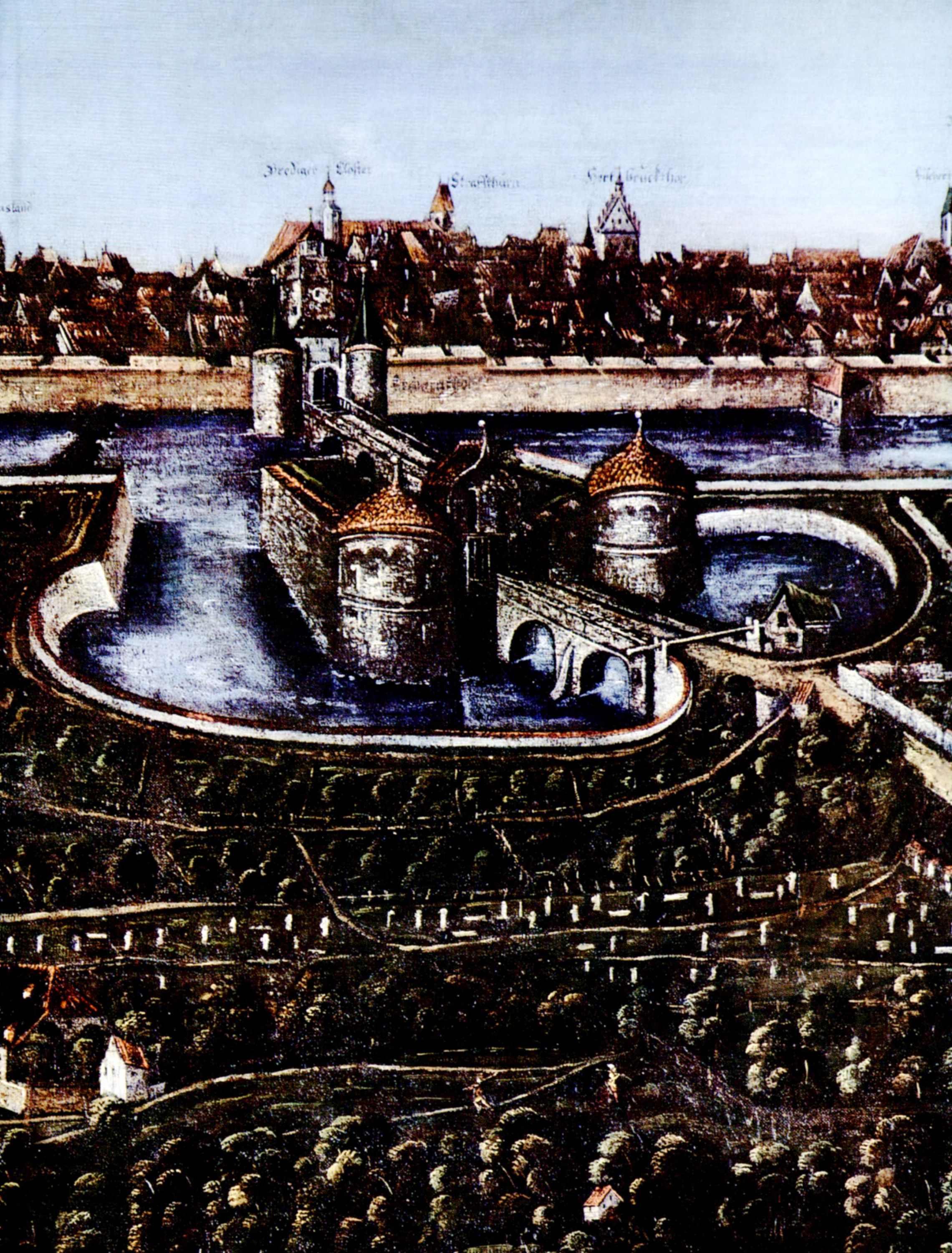 Die Belagerung Ulms im Fürstenkrieg: Ausschnitt, 1552, Ölgemälde von Georg Rieder II.